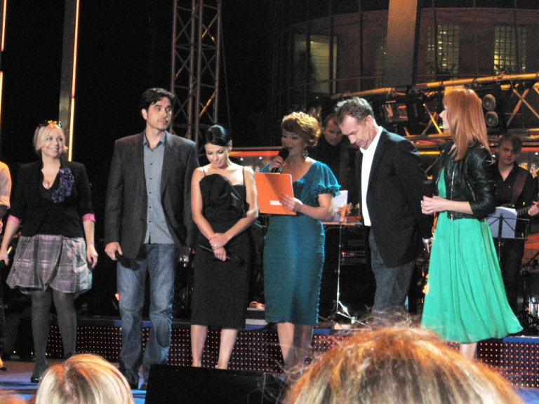 Koncert inaugurujący jesienną ramówkę TVP (Warszawa, ul. Woronicza): aktorzy serialu Tancerze